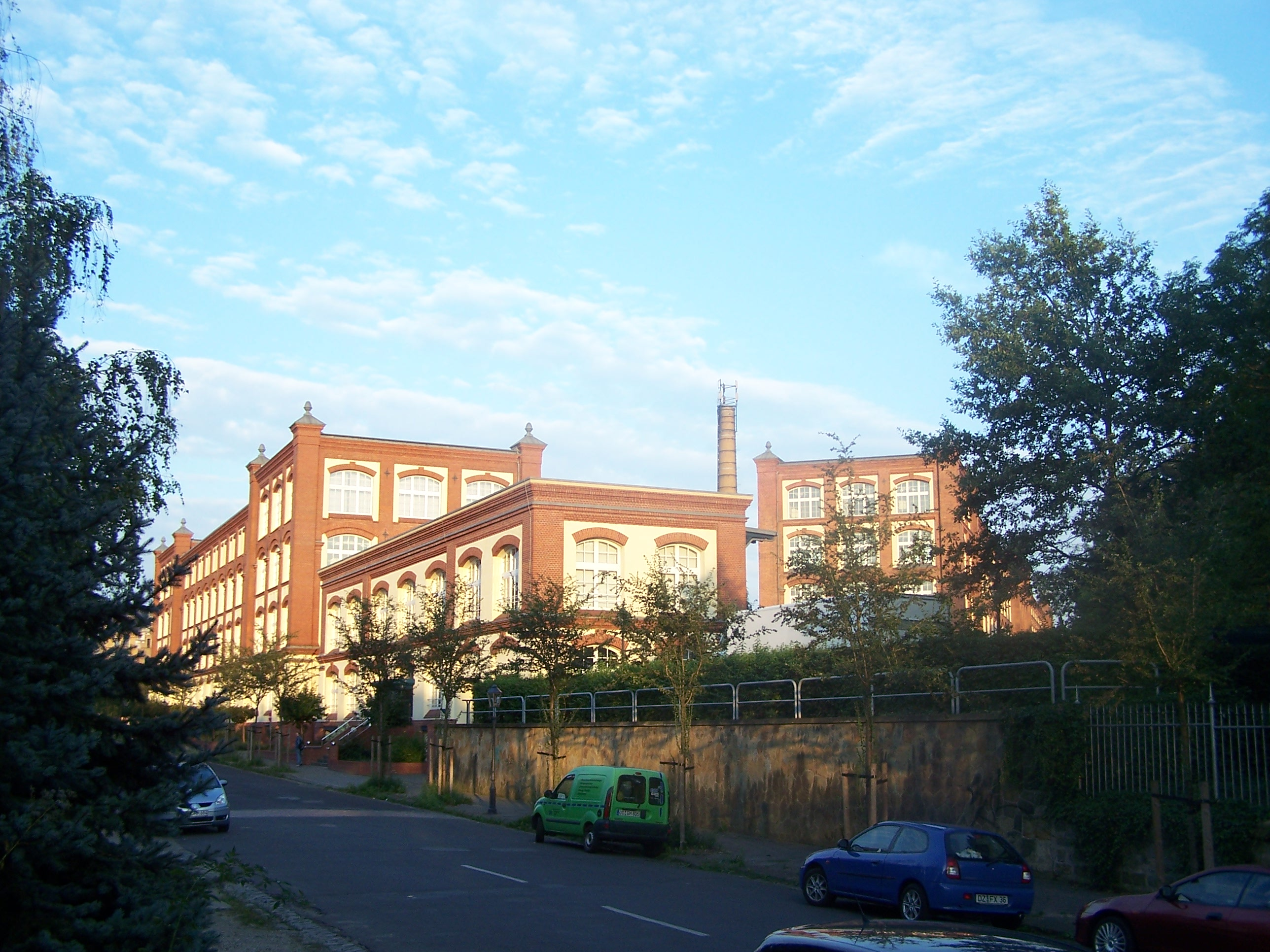 ehemalige Eschebachwerke in Dresden-Pieschen, heute unter anderem Sitz des Sozialrathauses der Stadt Dresden